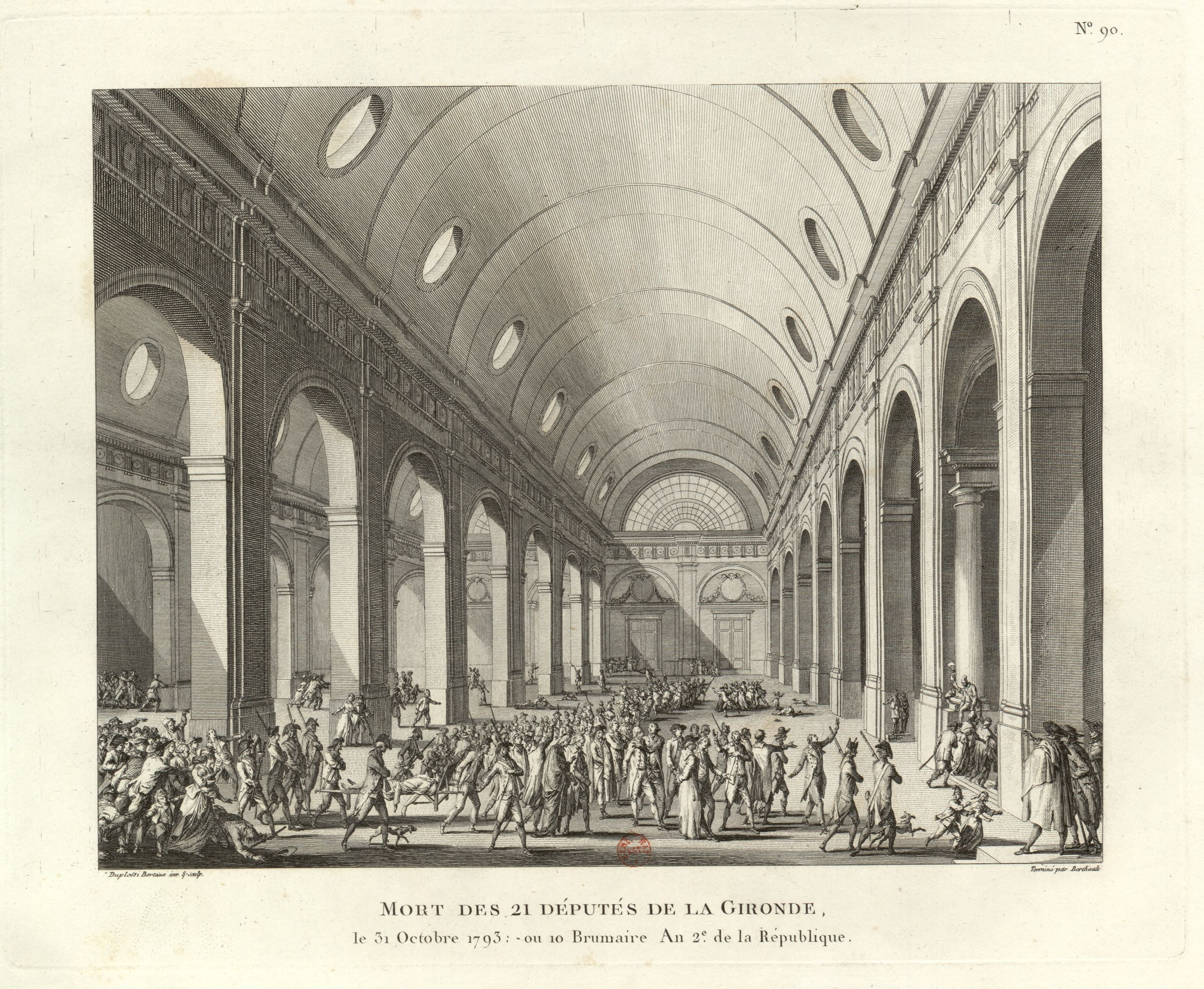 21 députés de la Gironde en route pour la guillotine, 31 octobre 1793. Tableau nº 90, extrait de la Collection complète des tableaux historiques de la Révolution française.